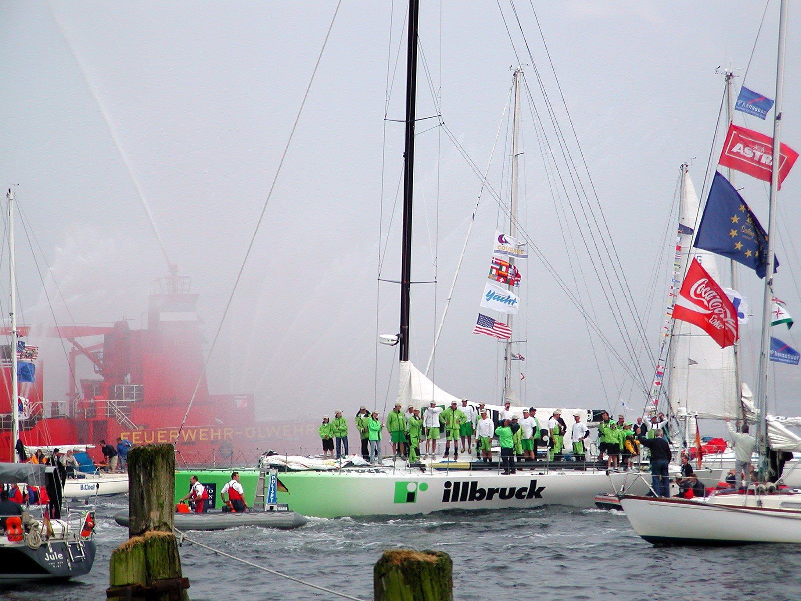 Volvo Ocean Race 2001/2002: Gesamtsieger illbruck im Zielhafen Kiel.